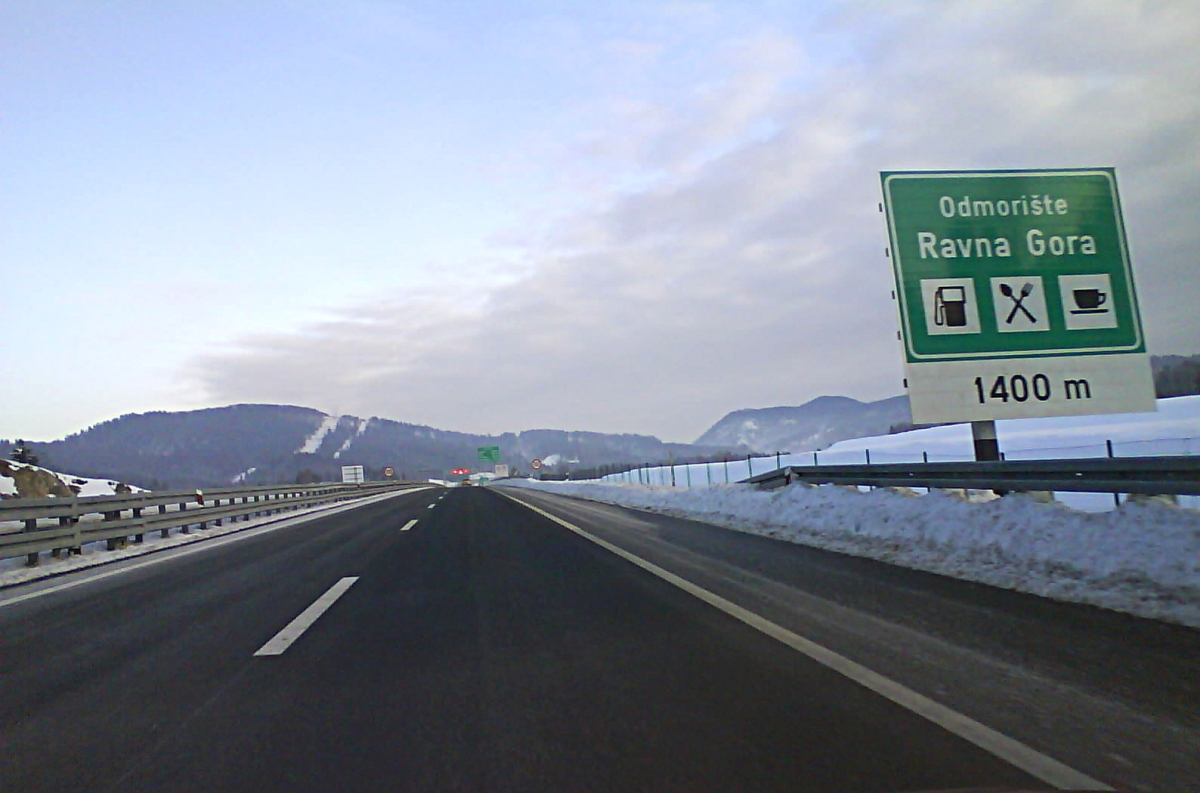 Autocesta A6